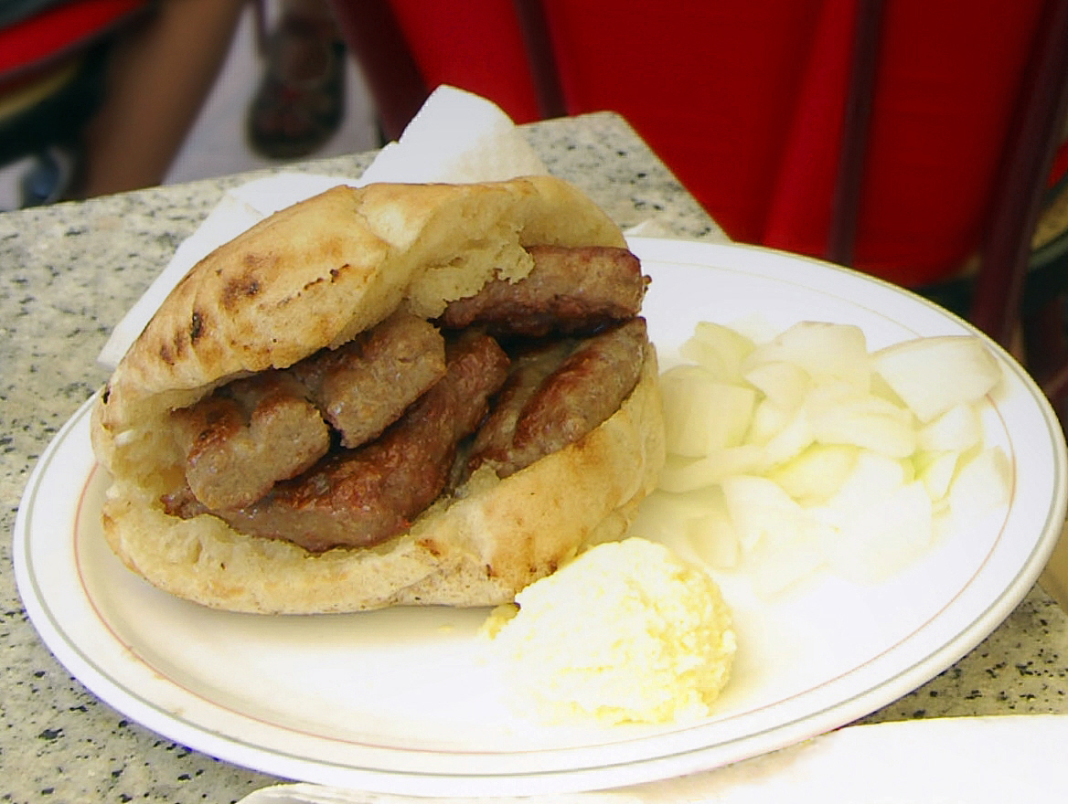 Ćevapi in Brot (Lepinja), mit roher, gehackter Zwiebel und Kajmak. Hier in einem Imbiss in Zagreb in Kroatien.